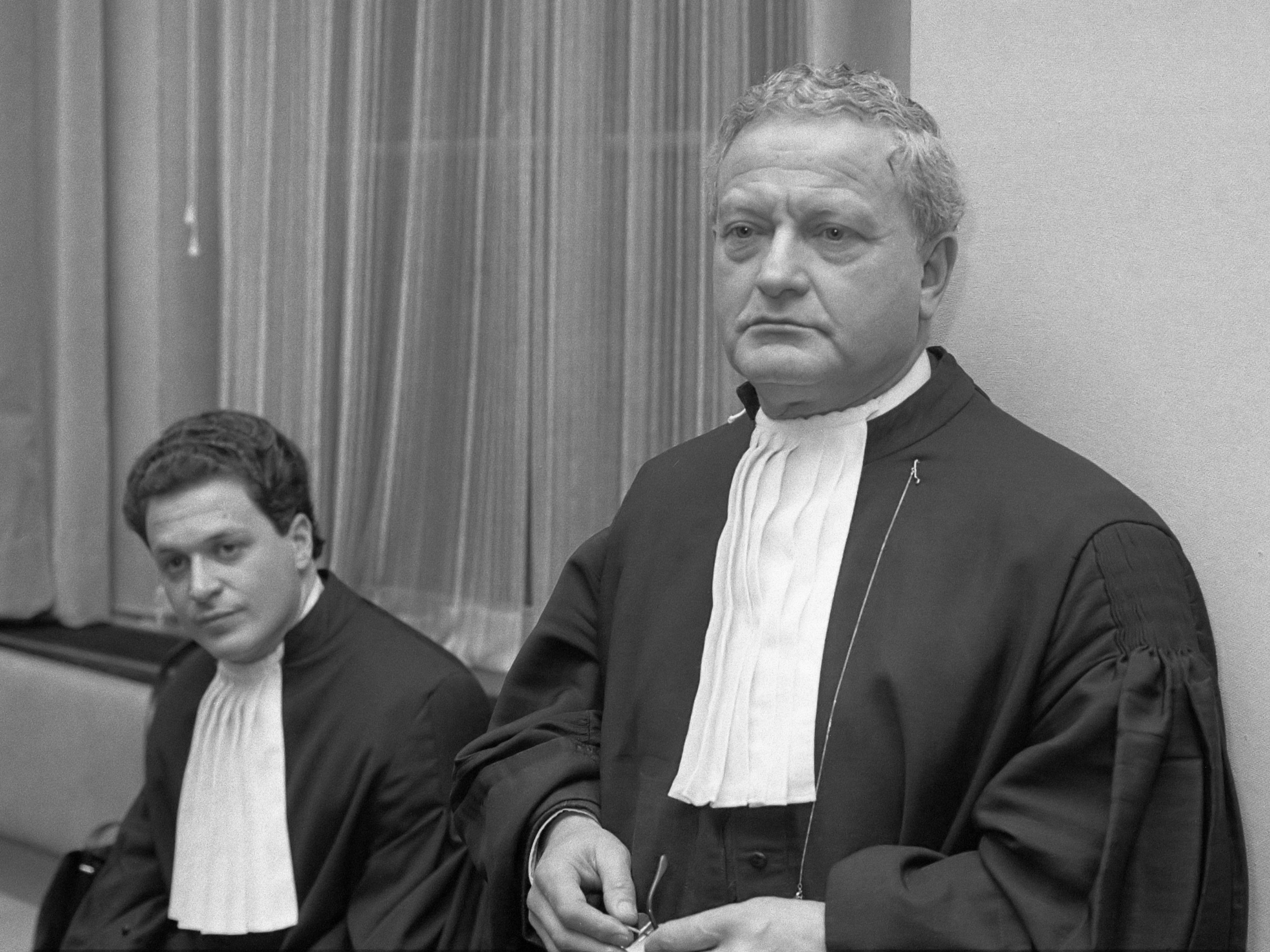 Proces tegen Heinekenontvoerders Cor van Hout en Willem Holleeder in Paleis van Jusitie in Amsterdam; advocaten mr. M. Moszkowicz (r.) en zijn zoon B. Moszkowicz 22 januari 1987